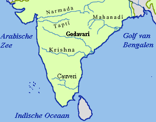 Godavari river in India